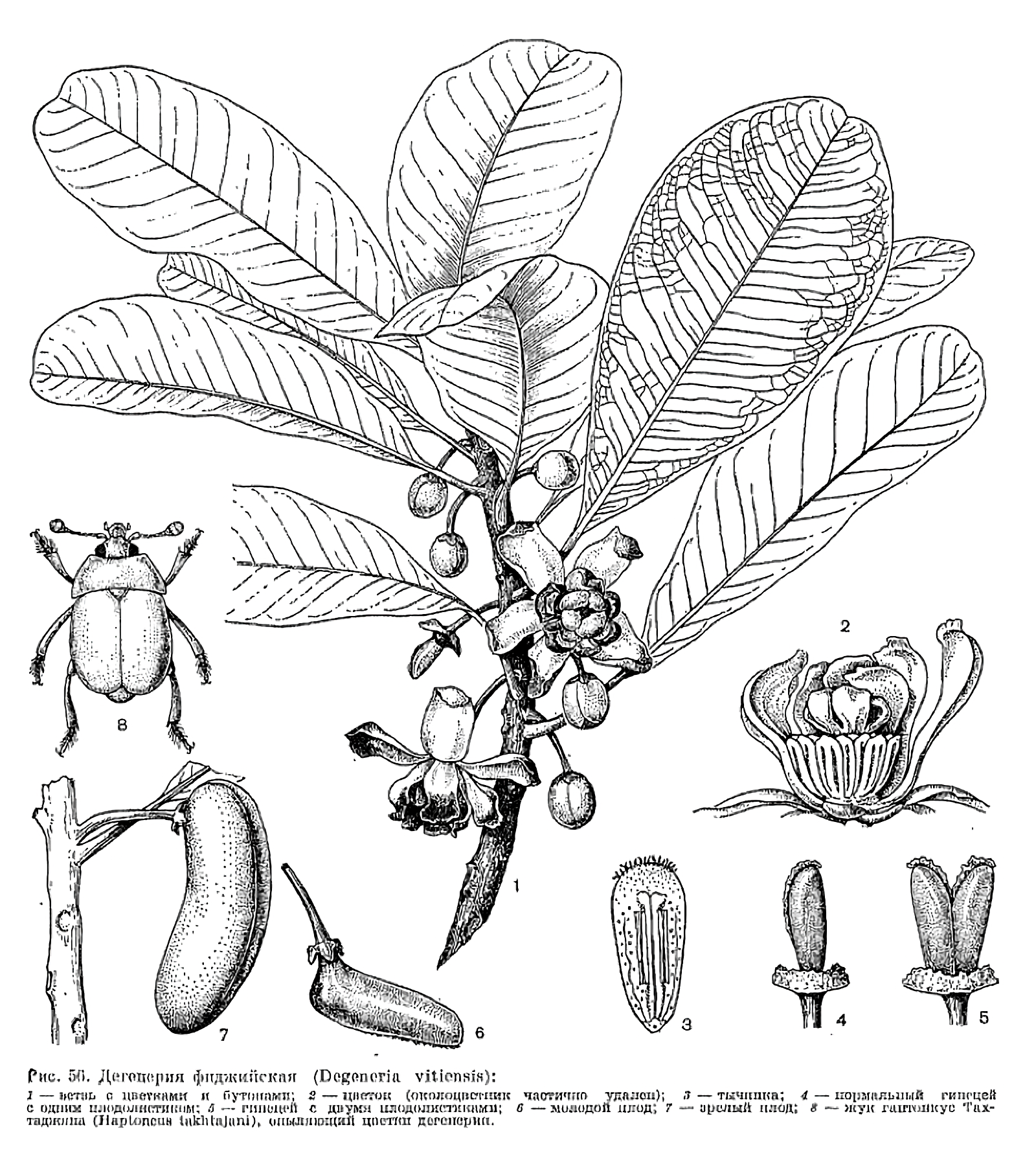 Degeneria vitiensis